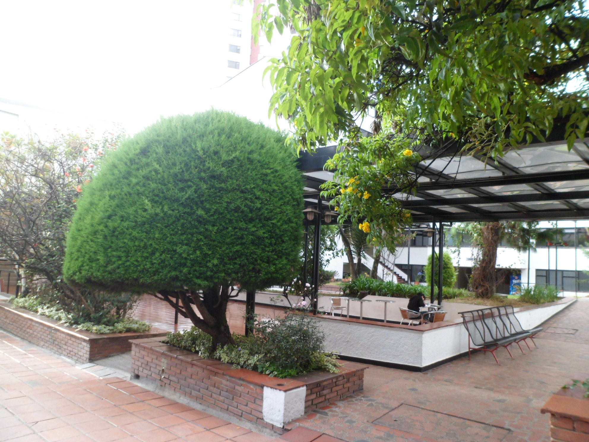 campus sede centro Universidad Central de Colombia